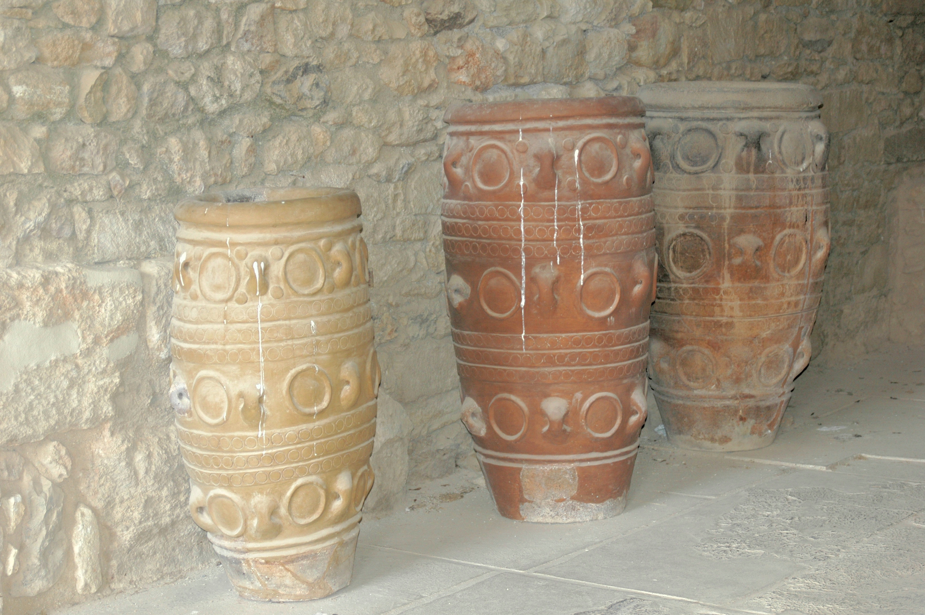 Jarras de almacenamiento de Cnosos